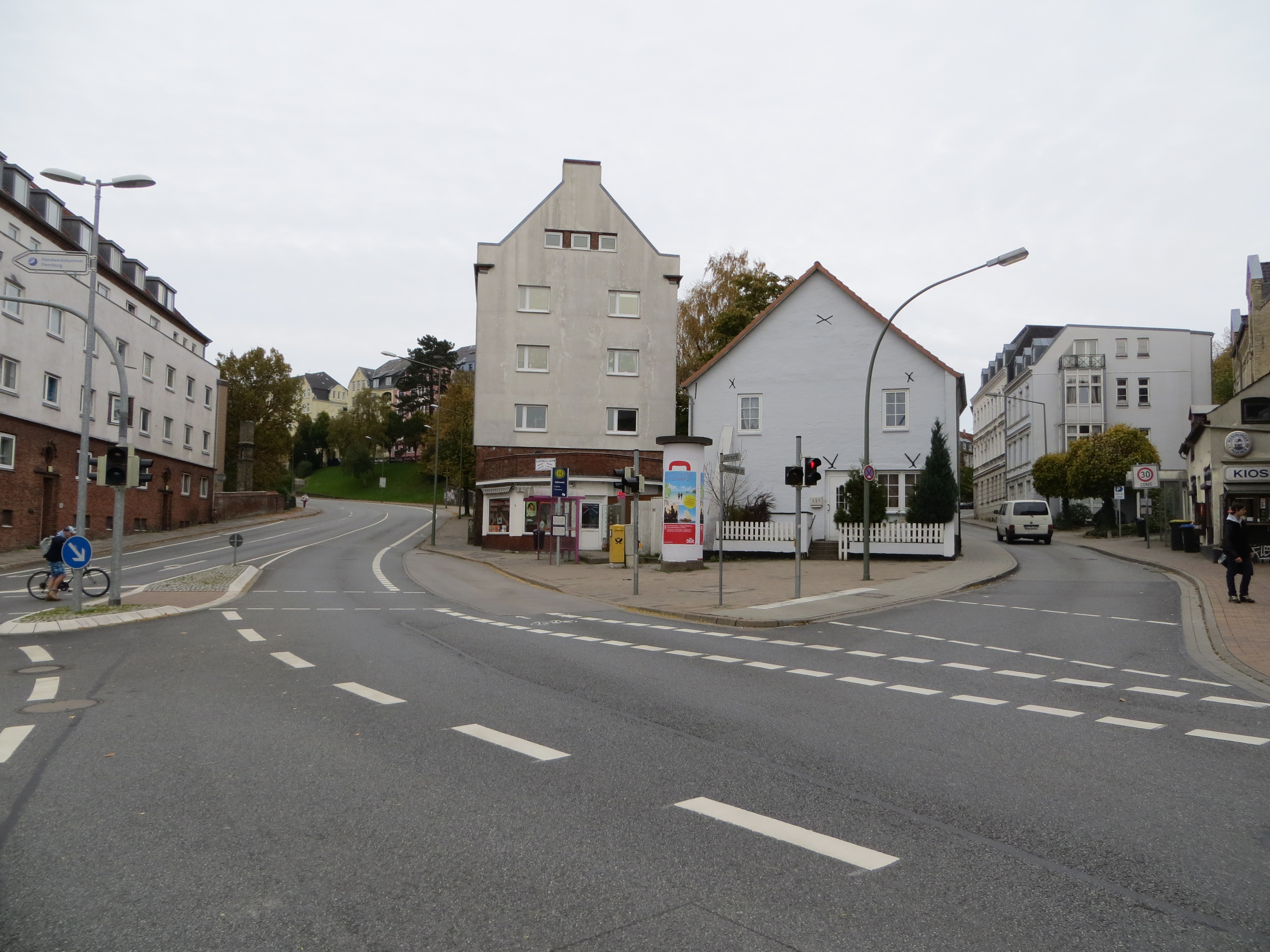 Hafermarkt im Oktober 2013 (Flensburg), Bild 002